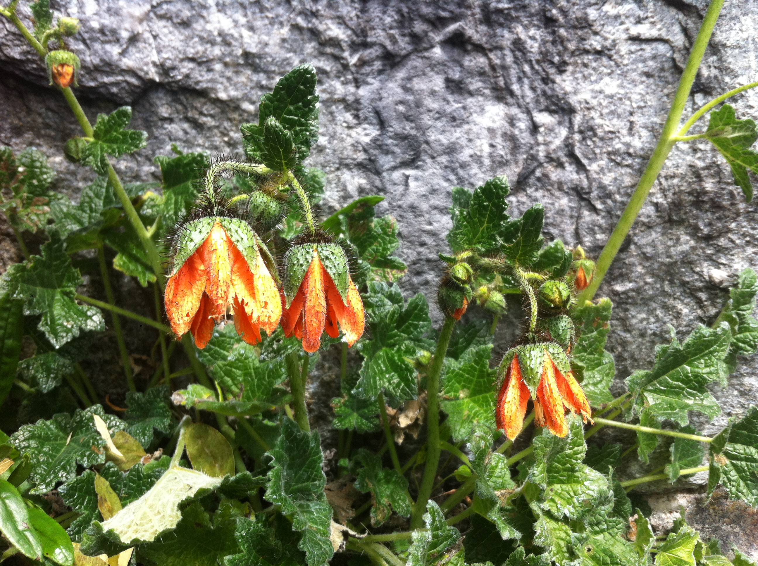 Fotografía tomada el 25 de mayo de 2019, en la quebrada Alpamayo, Parque Nacional Huascaran.